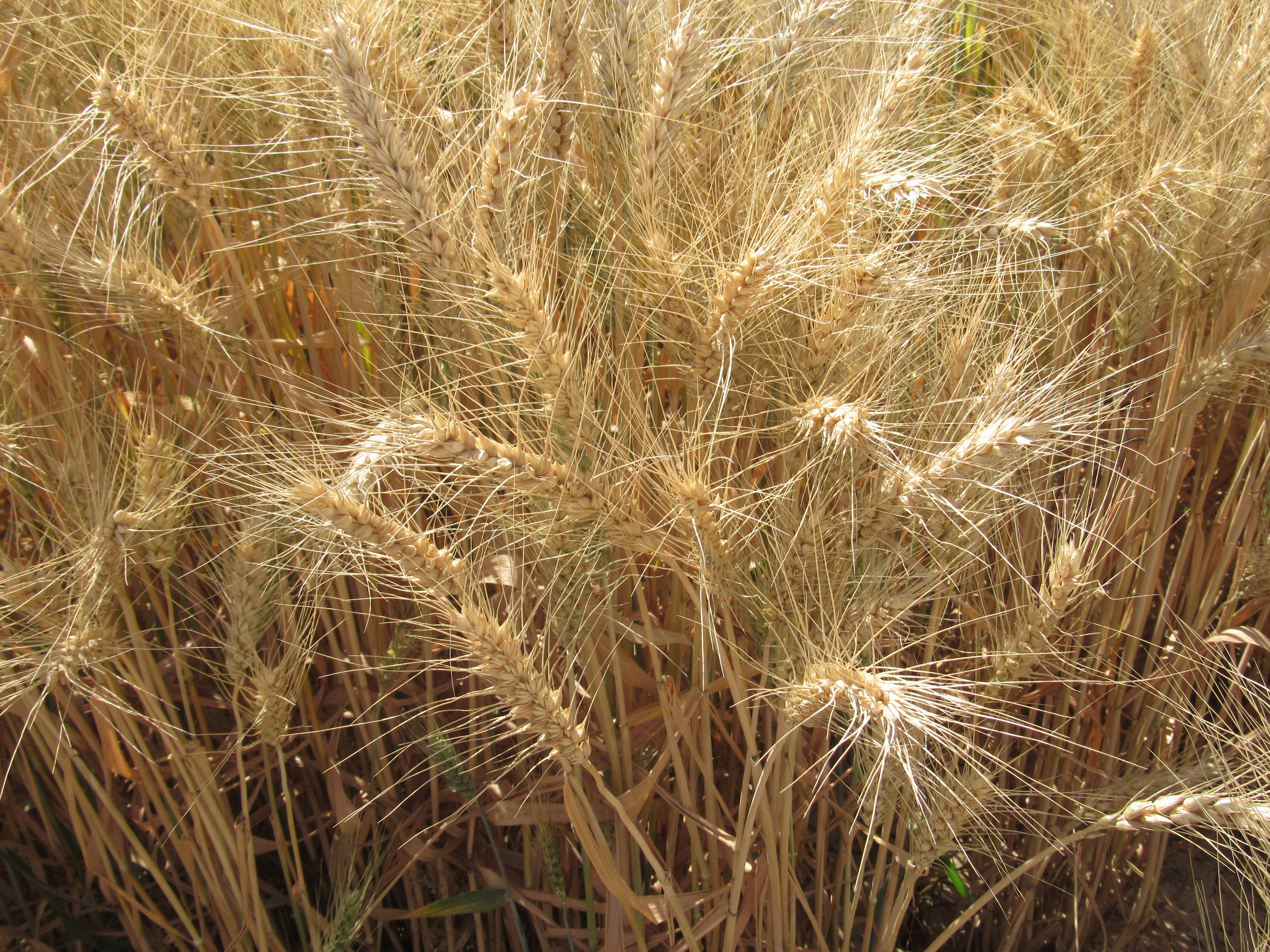 خوشه های گندم درشهر صفی آباد